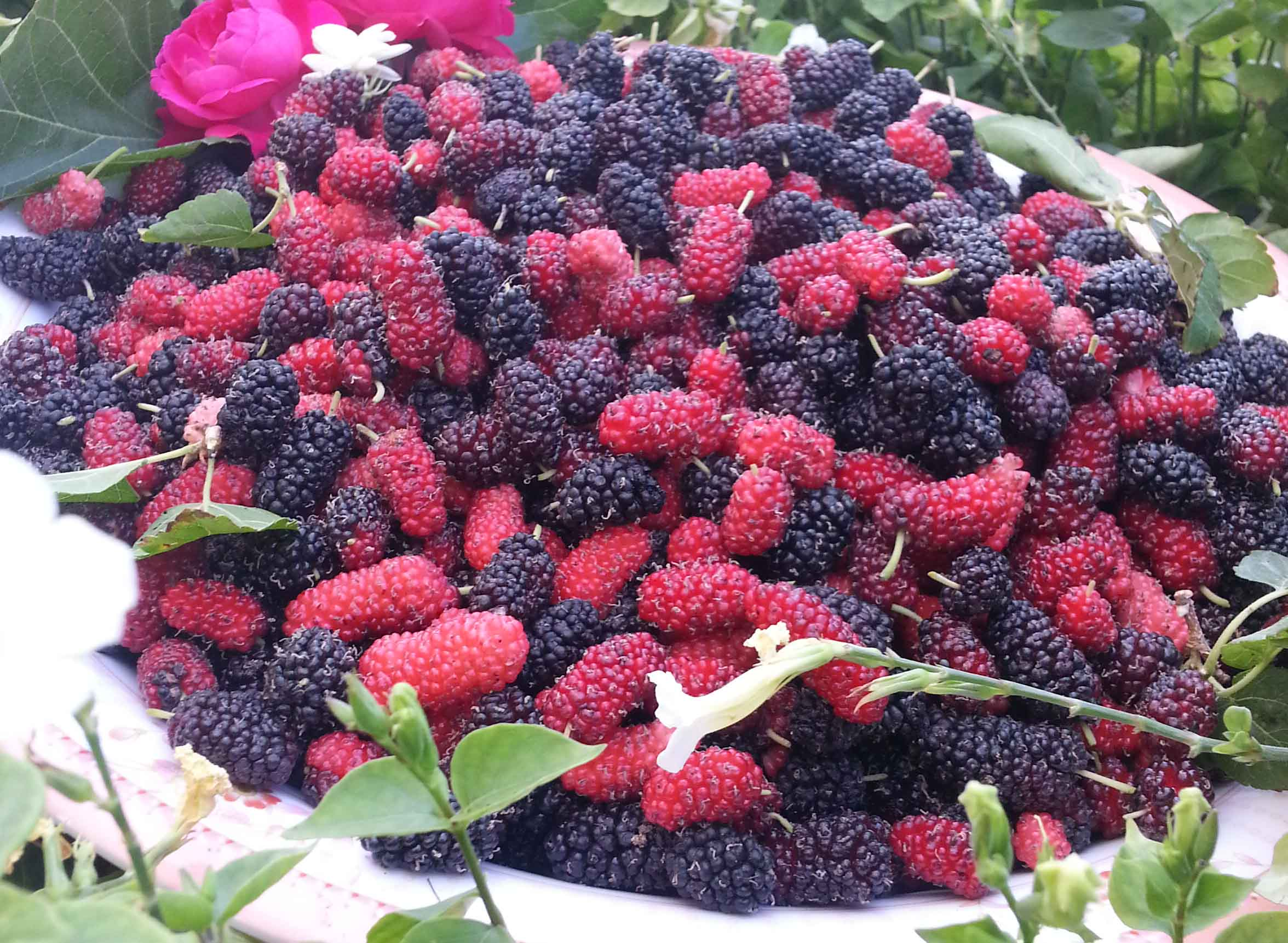 ثمار شجر التوت العماني